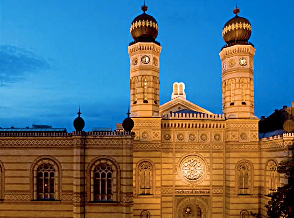 Budapest, Dohány utcai zsinagóga